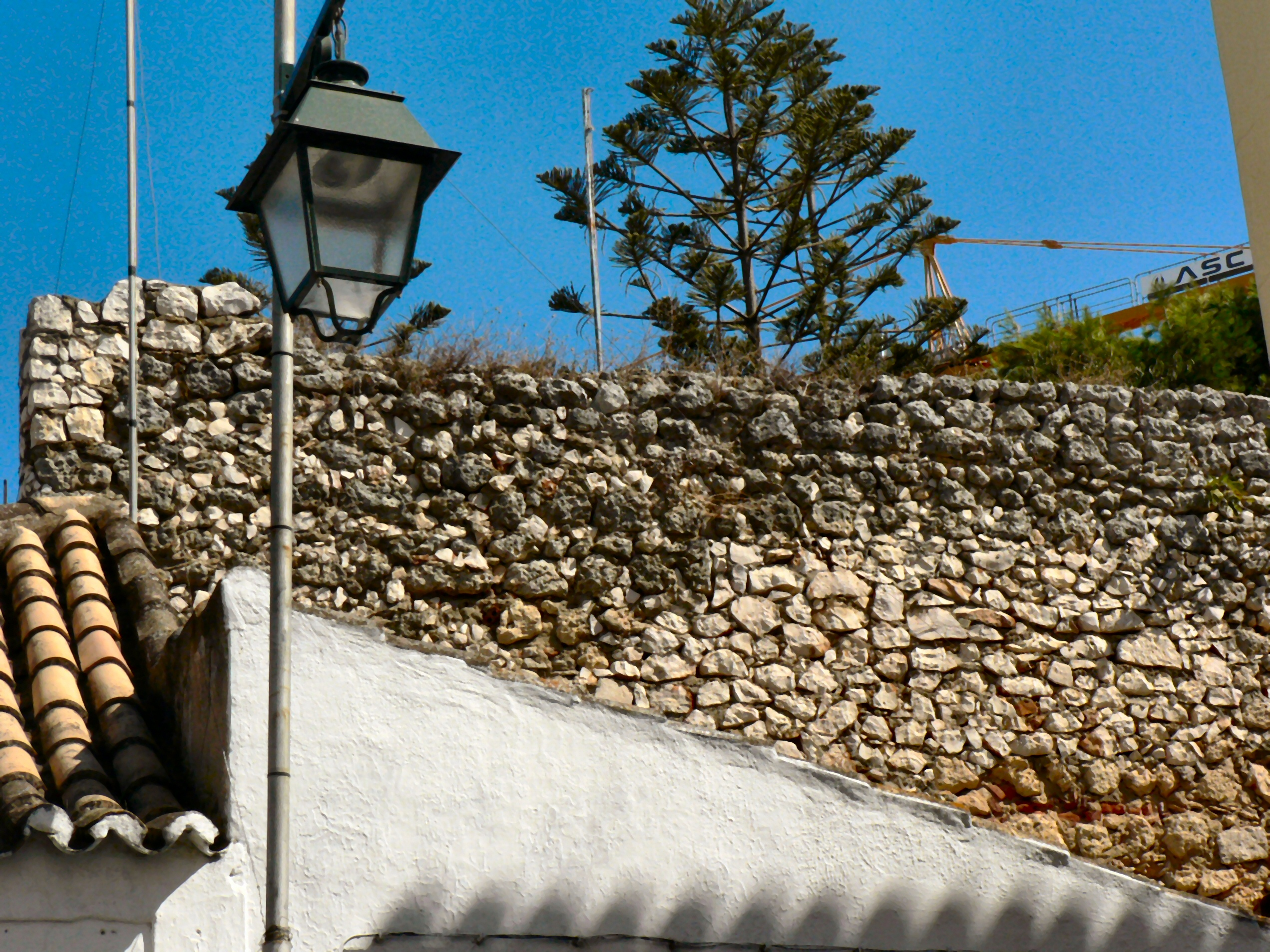 Ruínas do Castelo de Alvor